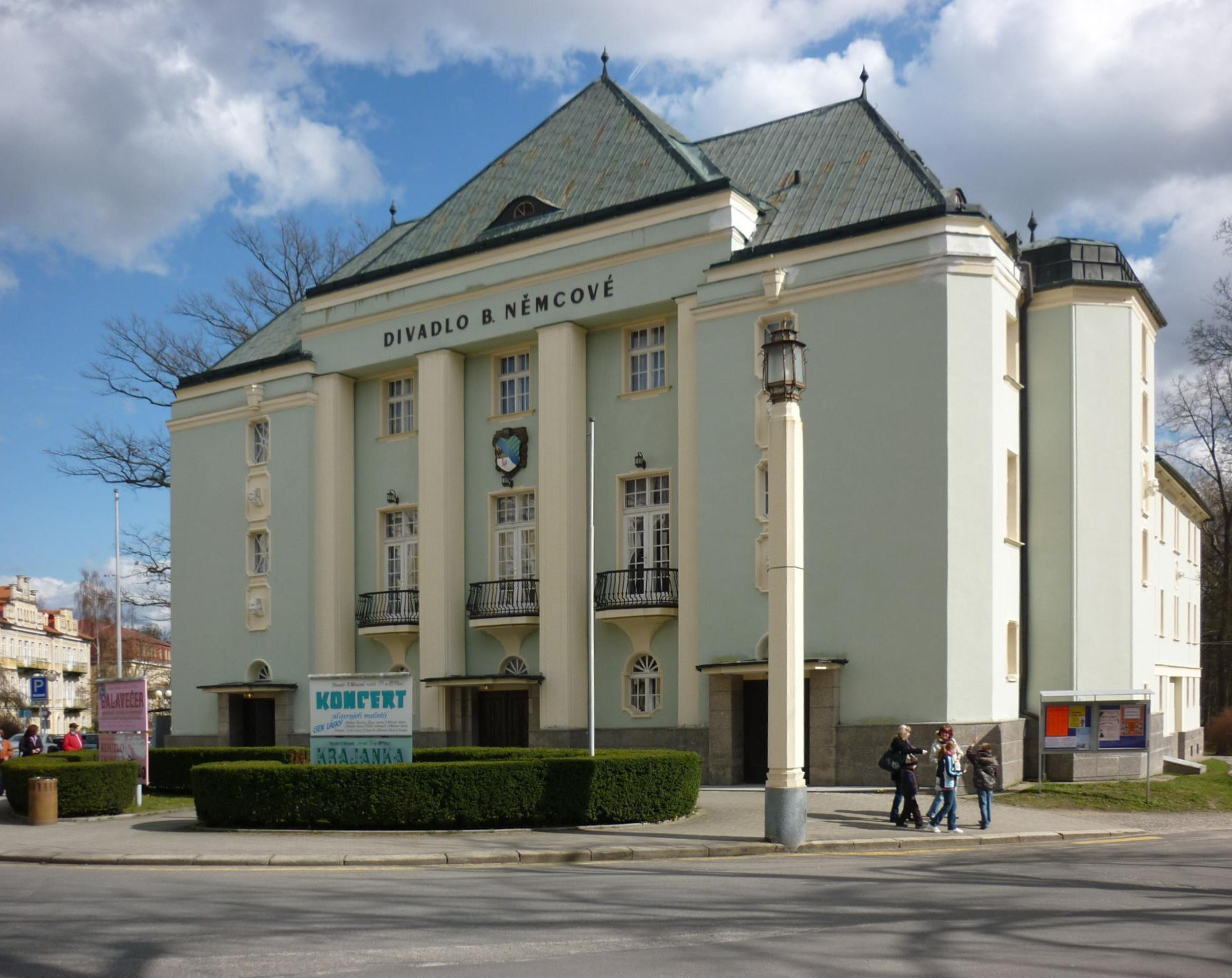 Františkovy Lázně